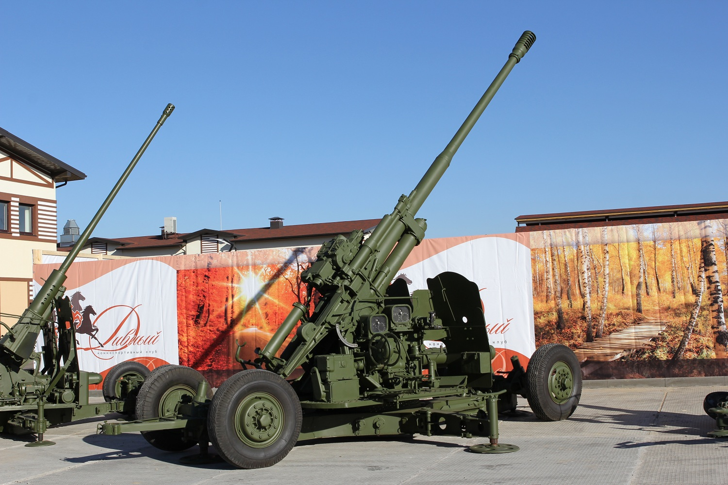 100-мм зенитная пушка КС-19 в Музее отечественной военной истории